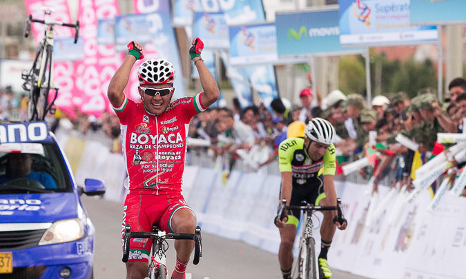 Eta2. Vuelta a Colombia 2015 Lunes 3 de agosto de 2015. Bogotá - Paipa (174Kms)